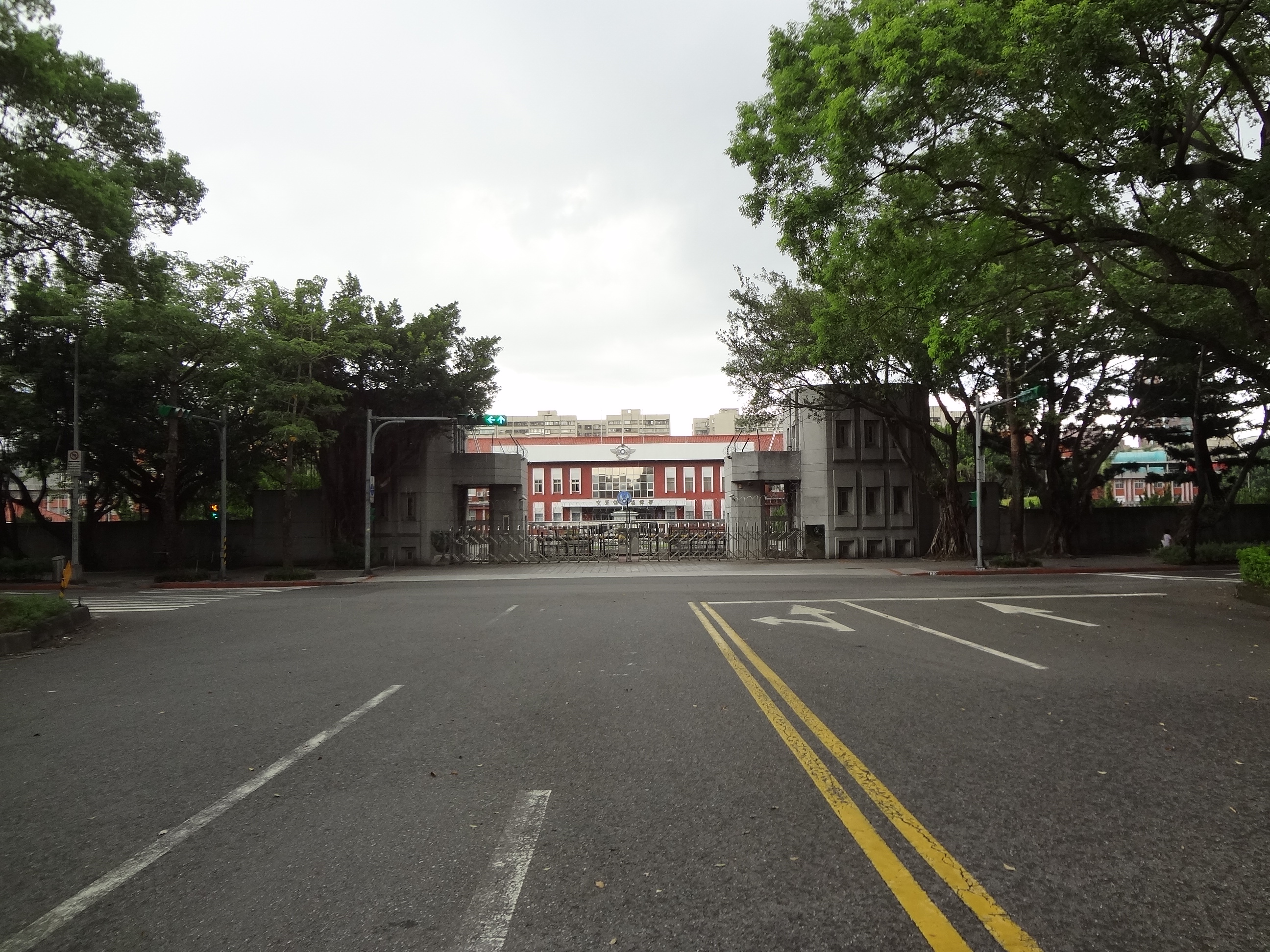 中華民國空軍仁愛營區，位於臺北市大安區仁愛路三段55號，為國防部空軍司令部舊址，拍攝時由空軍保修指揮部使用中。